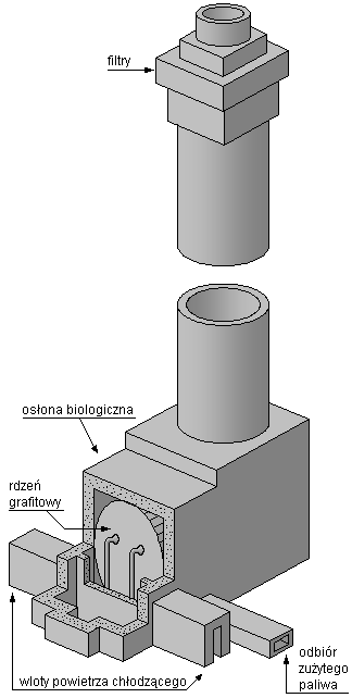 Reaktor Windscale - schemat